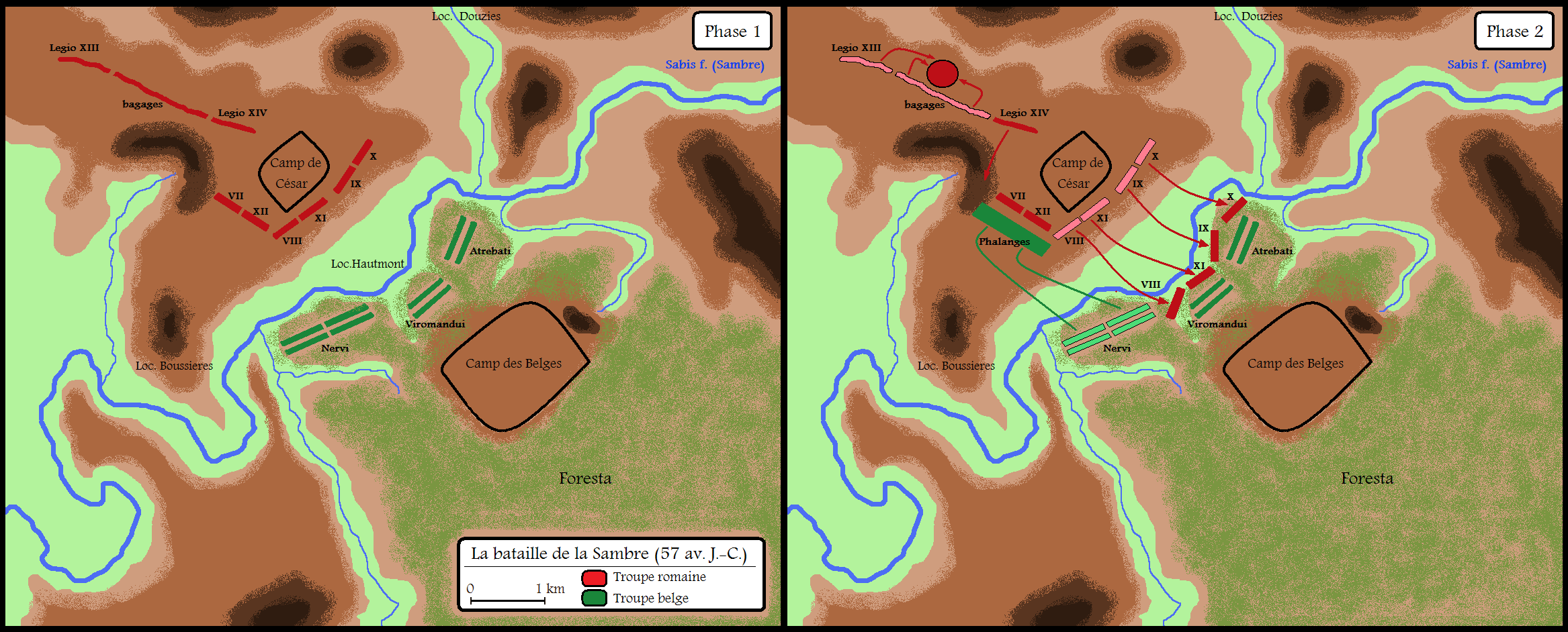 Bataille de la Sambre entre César et les Belges en 57 av. J.-C.